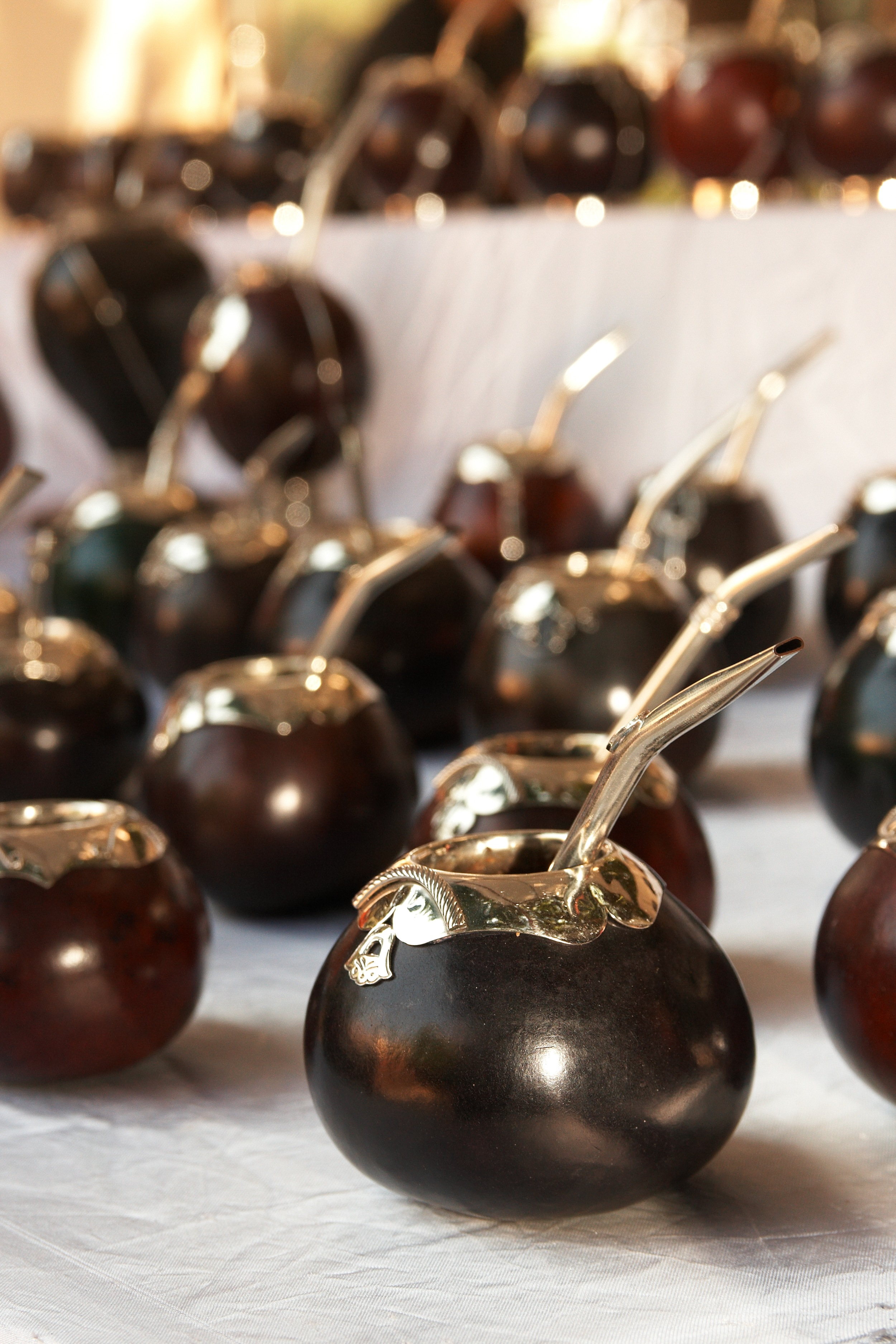 Mates en la Recoleta, Buenos Aires, Argentina.